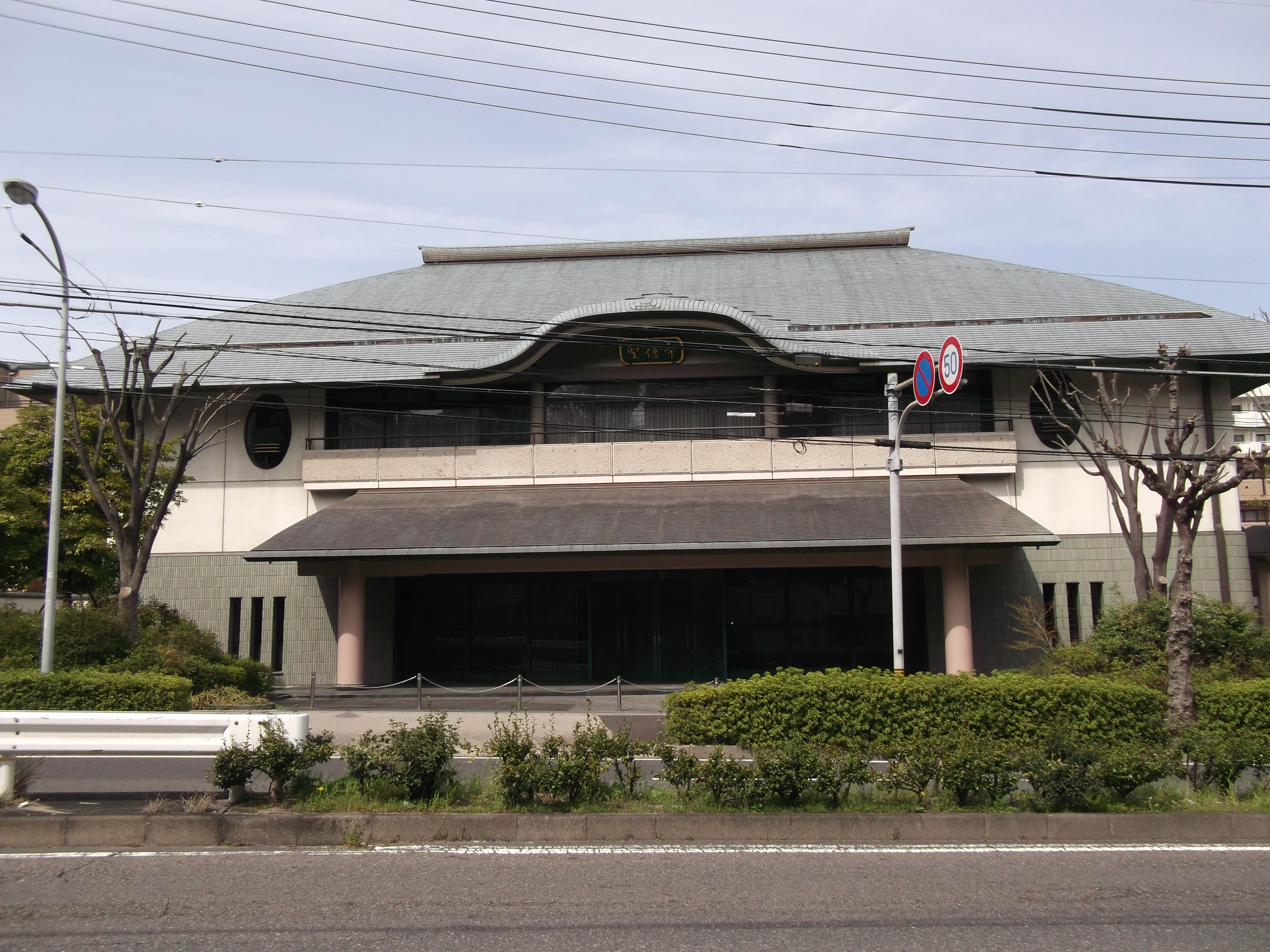 名古屋市天白区八事山の聖徳寺を南側公道より撮影